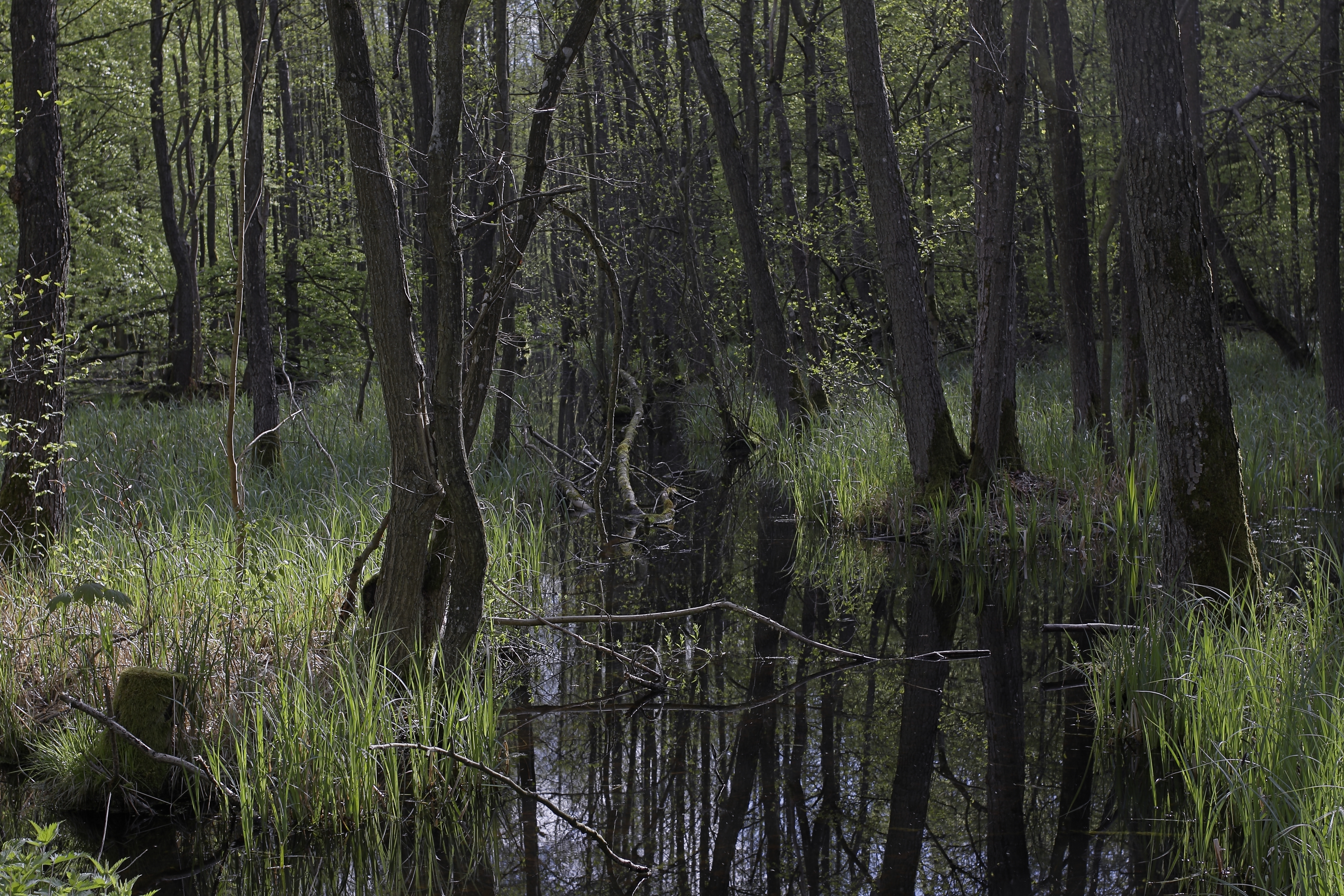 Naturwaldreservat Kronwald (Teilgebiet des NSG Kronwald) bei Loitz, Vorpommern-Greifswald ... Randbereichsaufnahme (Naturwaldreservat wurde nicht betreten !!!)